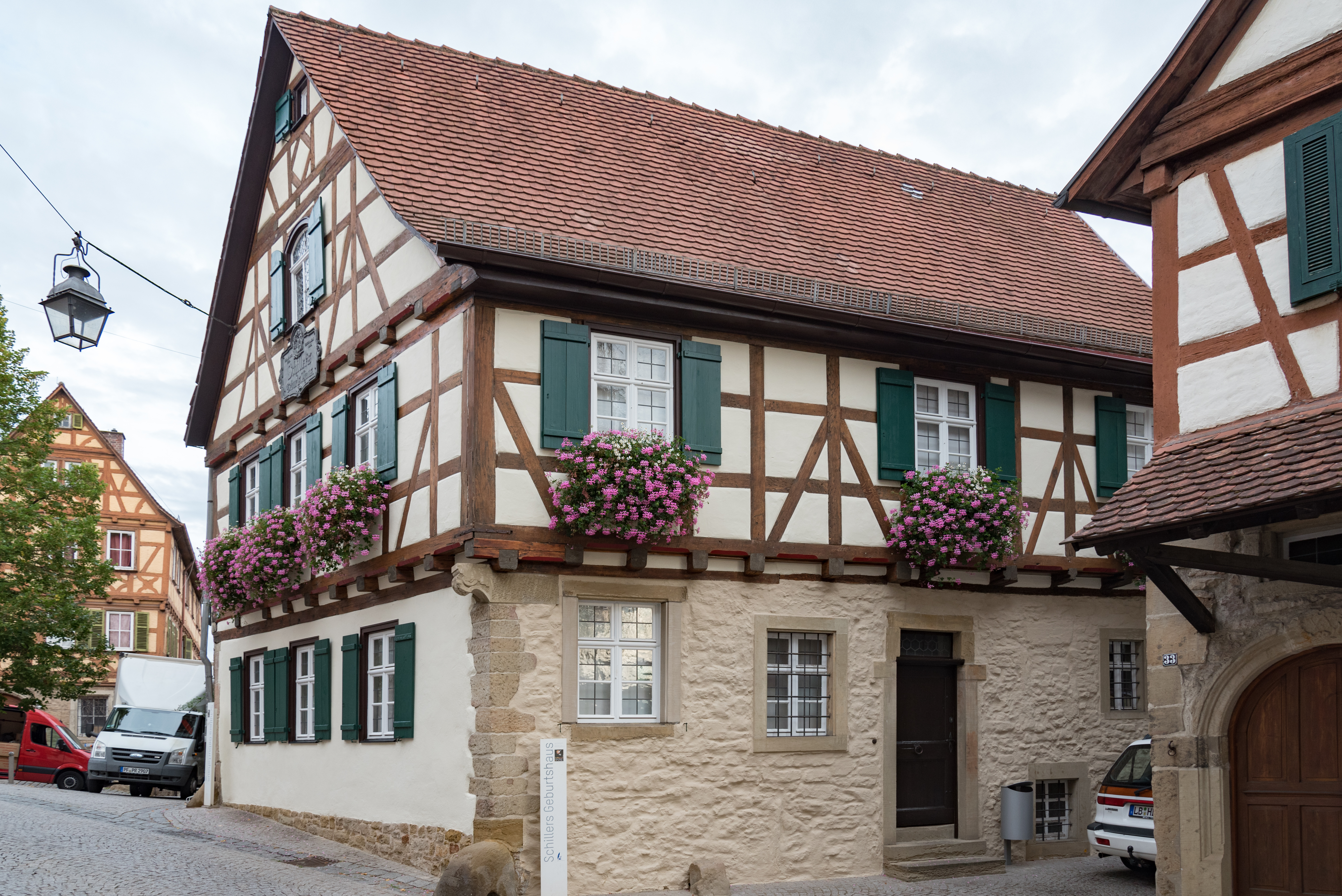 Marbach am Neckar, Niklastorstraße 31, Schillers Geburtshaus